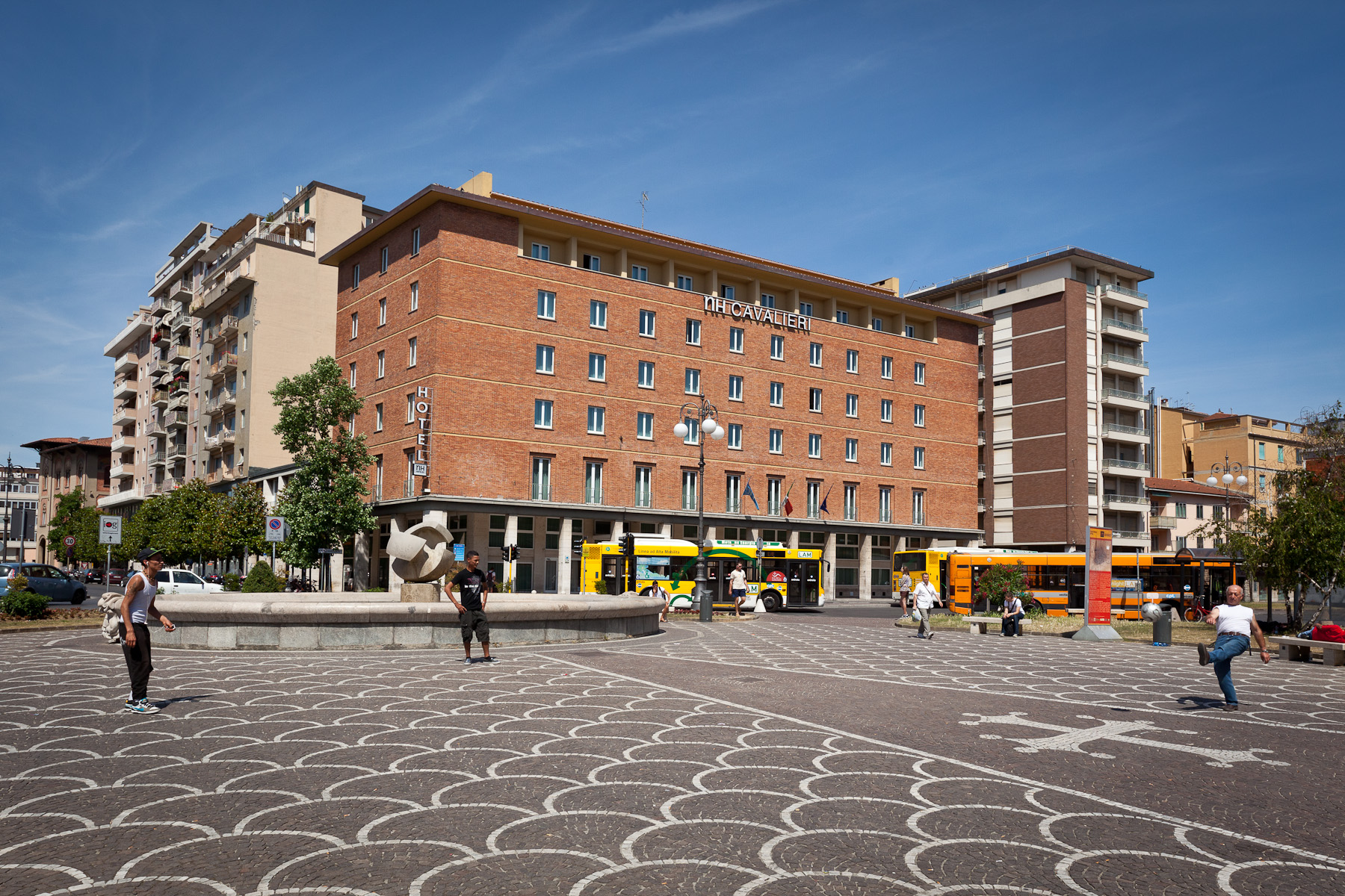 Pisa, Hotal Cavalieri, costrito dalla Società Generale Immobiliare.